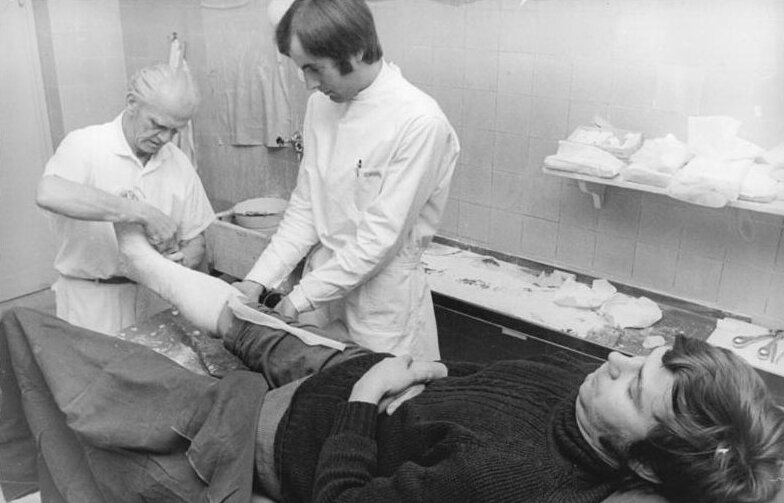 Berlin, Krankenhaus Friedrichshain, Unfallspoliklinik ADN-ZB Katschorowski 14.11.1972 Berlin: Unfallpoliklinik versorgt durch Unwetter verletzte Bürger. Im Krankenhaus Friedrichshain unternehmen Ärzte und Krankenpfleger alles Erdenkliche, um die medizinische Betreuung der Bürger zur Überwindung von Gesundheitsschäden zu gewährleisten. Dr. Bernd Müller (r.) und Krankenpfleger Arthur Arndt legen auf unserem Foto dem Patienten einen Gipsverband an.